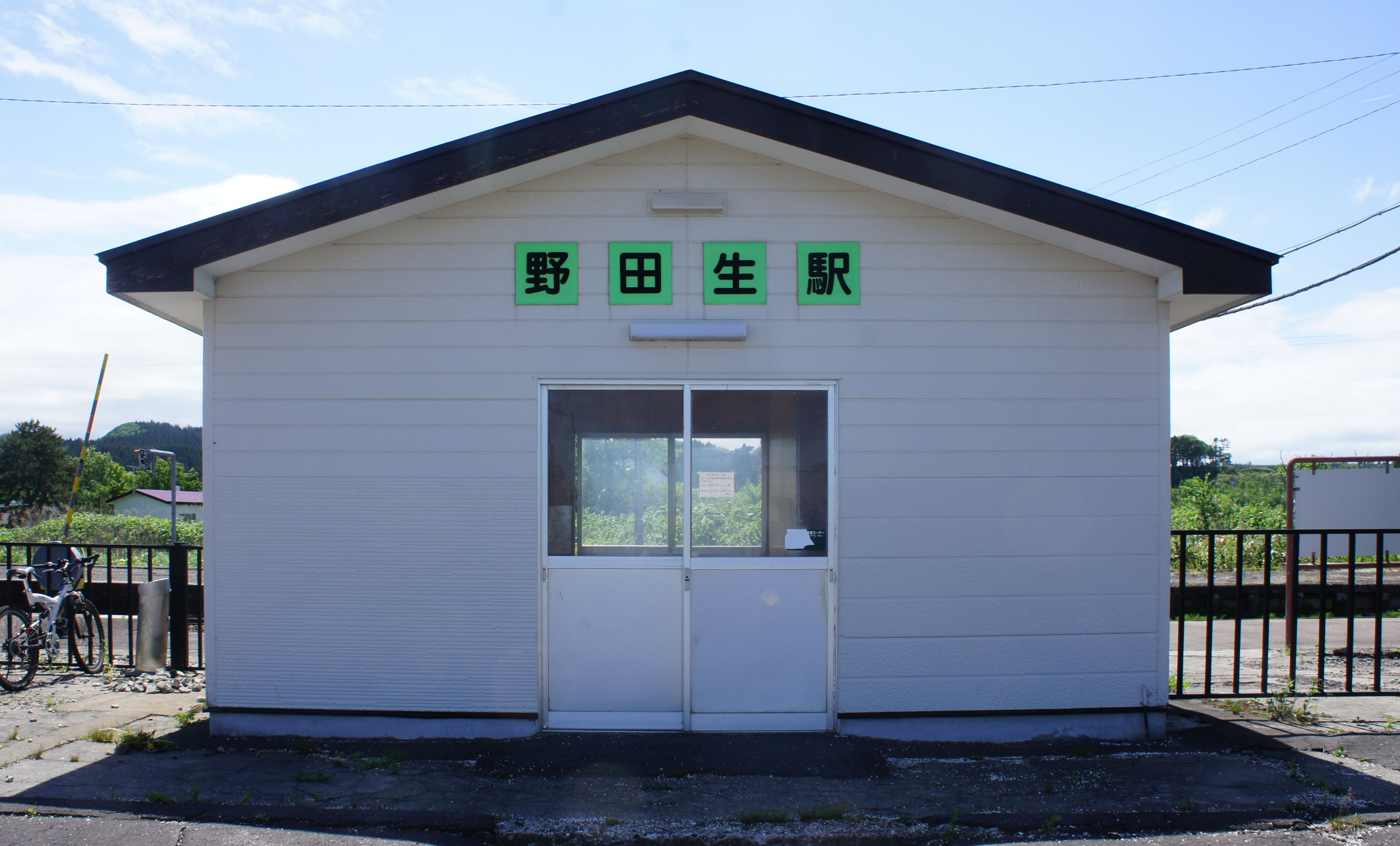 JR函館本線・野田生駅の駅舎